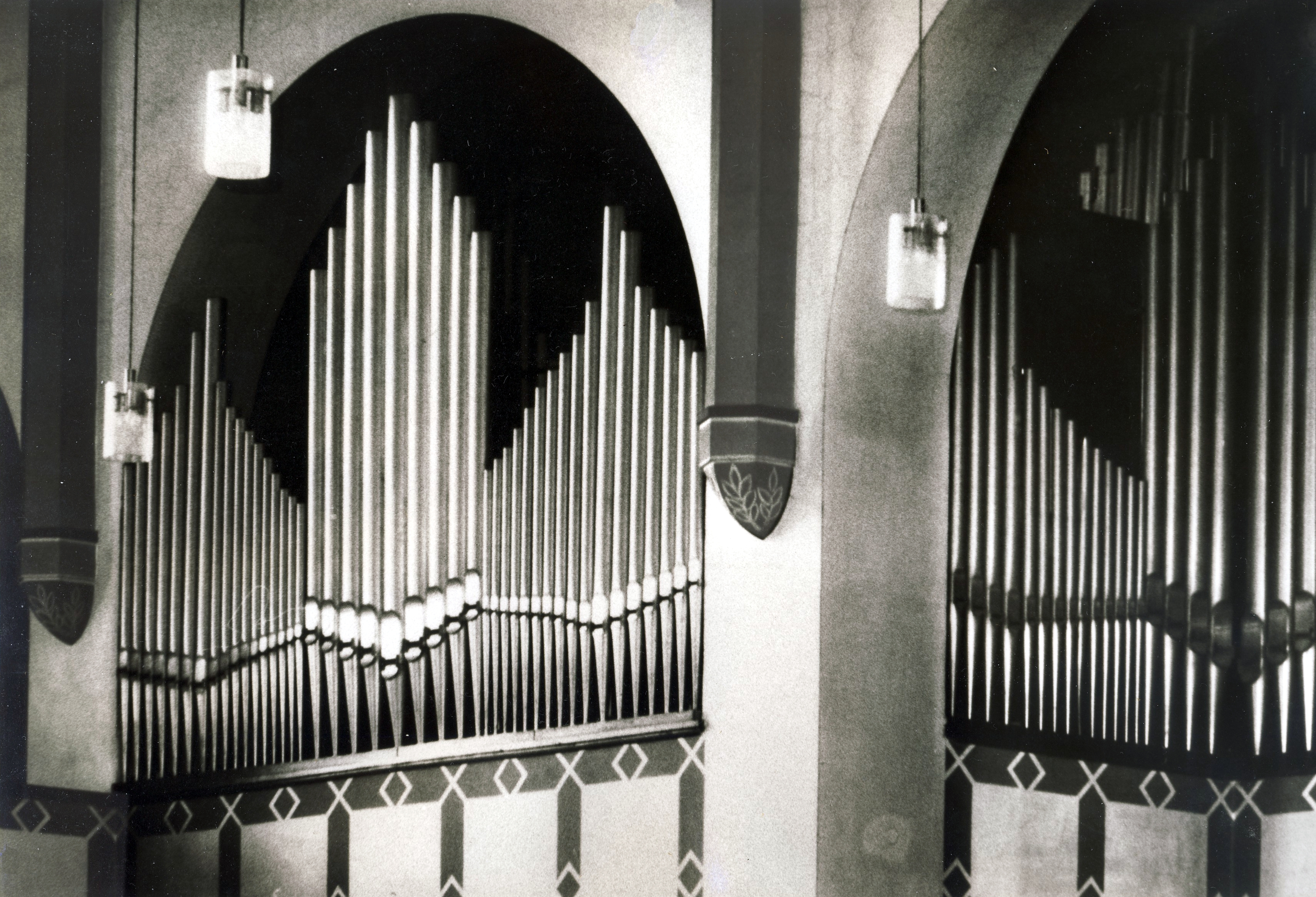 Pfarrkirche St. Mauritius Kärlich: Orgel von 1894 nach Renovierung und Erweiterung von 1973 mit neuem Freipfeifenprospekt